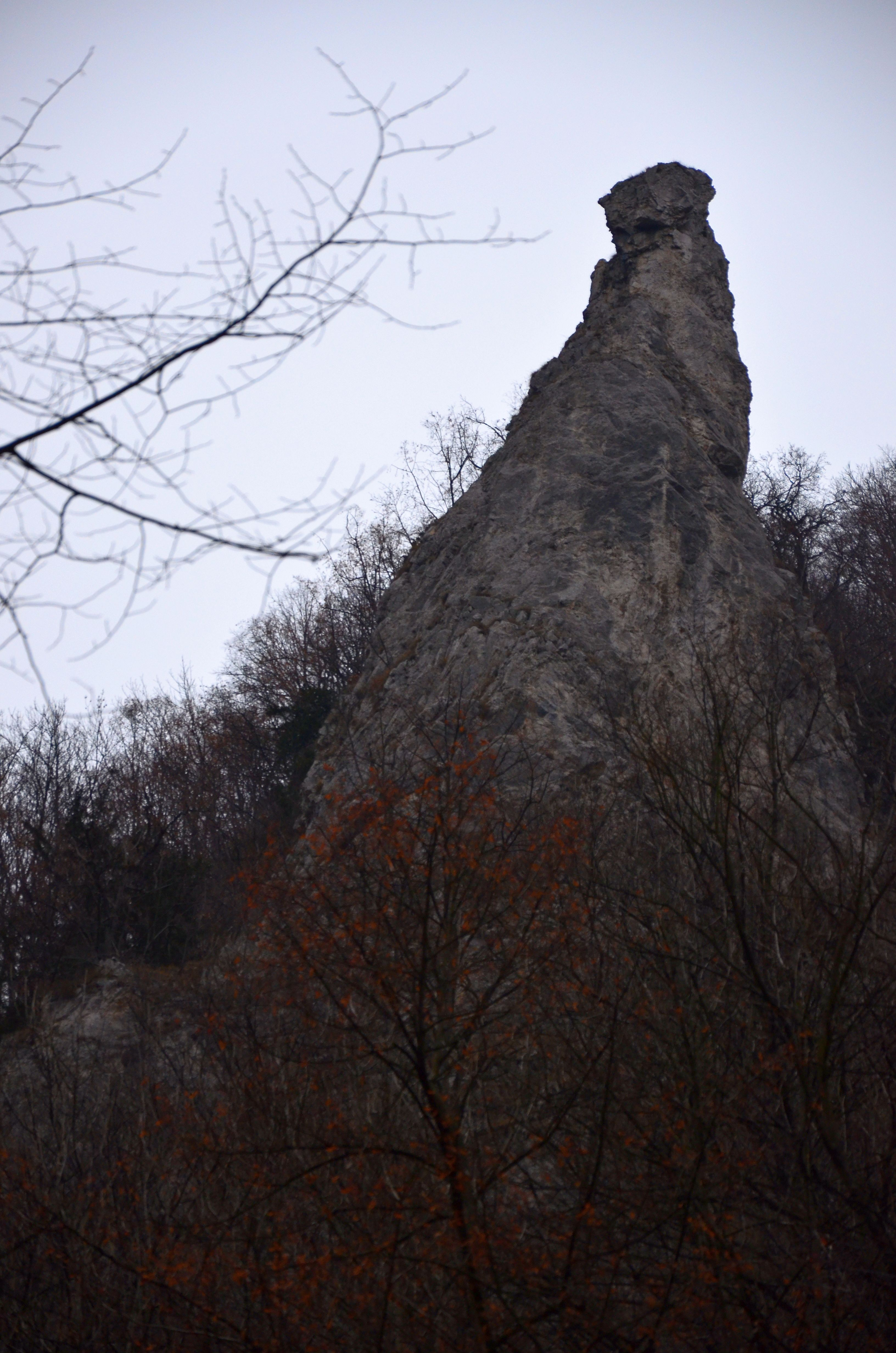 Malá cukrová homoľa v svahu Zádielskej planiny.